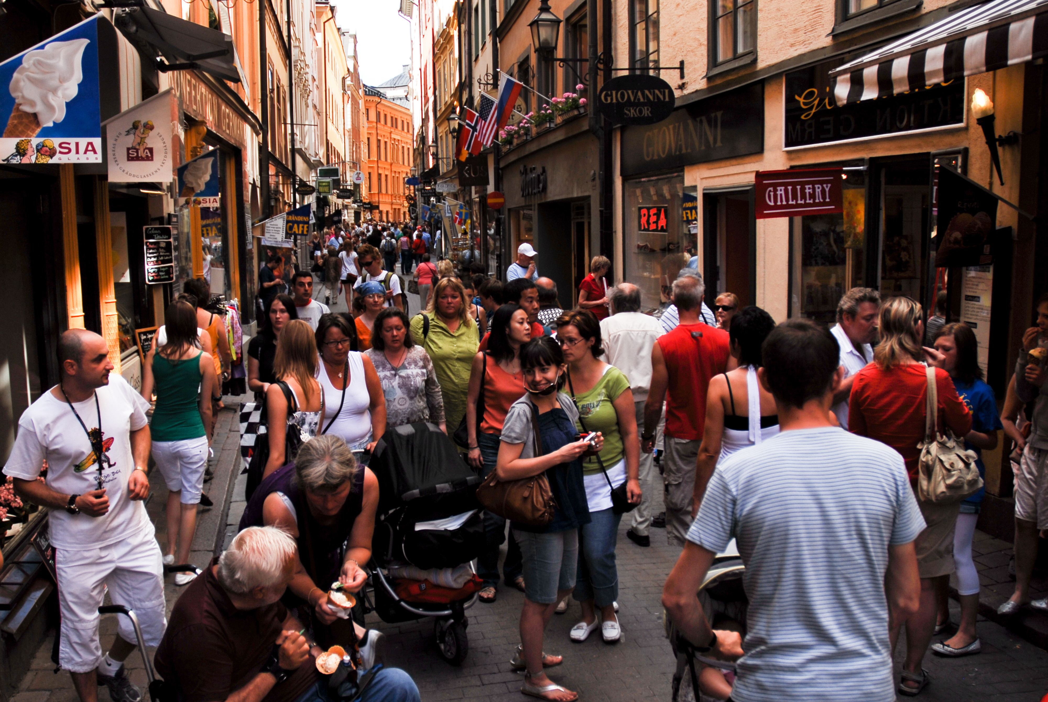 VГ¤sterlГҐnggatan street, Stockholm, Sweden, Northern Europe.